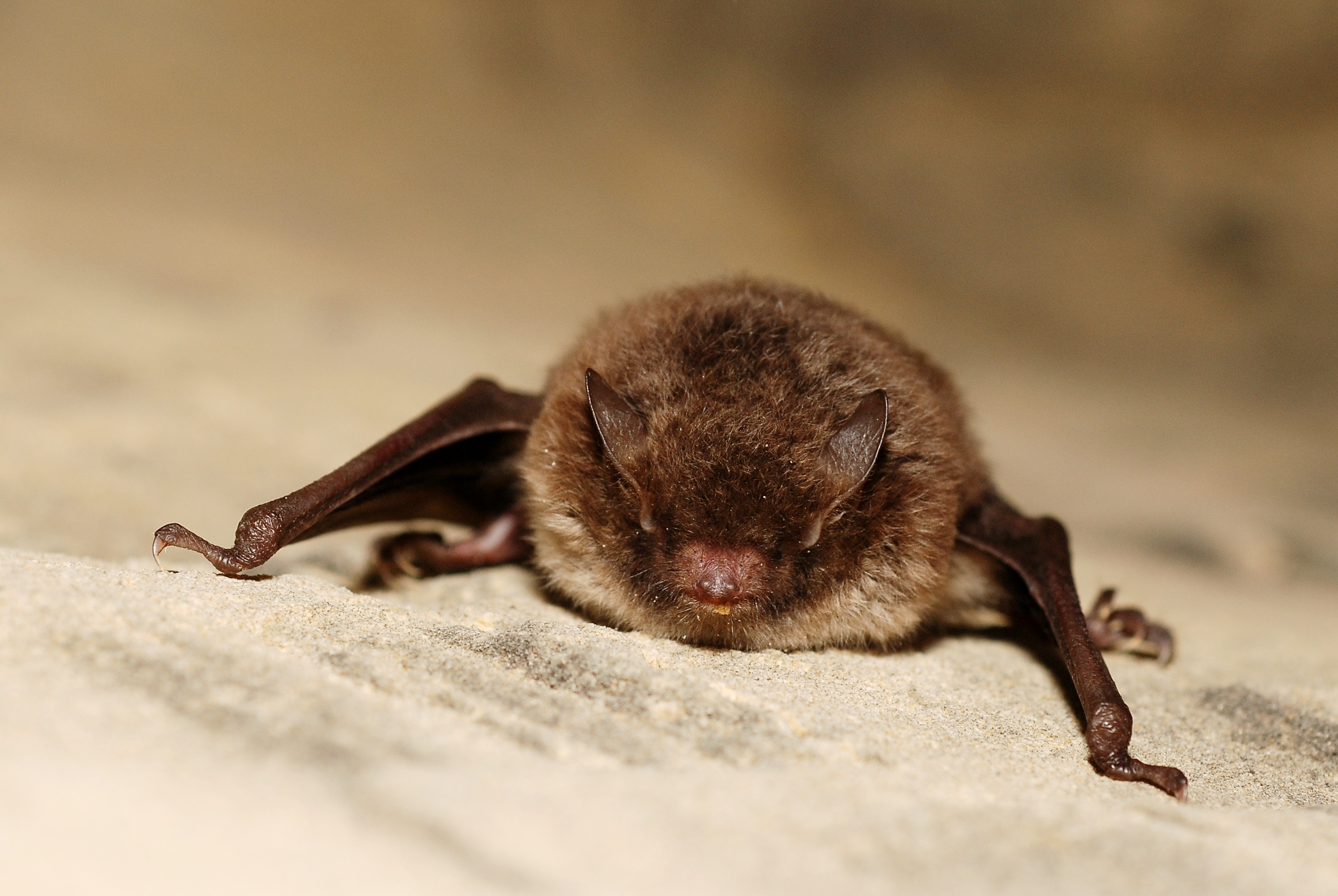 Myotis daubentoni - bat - chiroptera